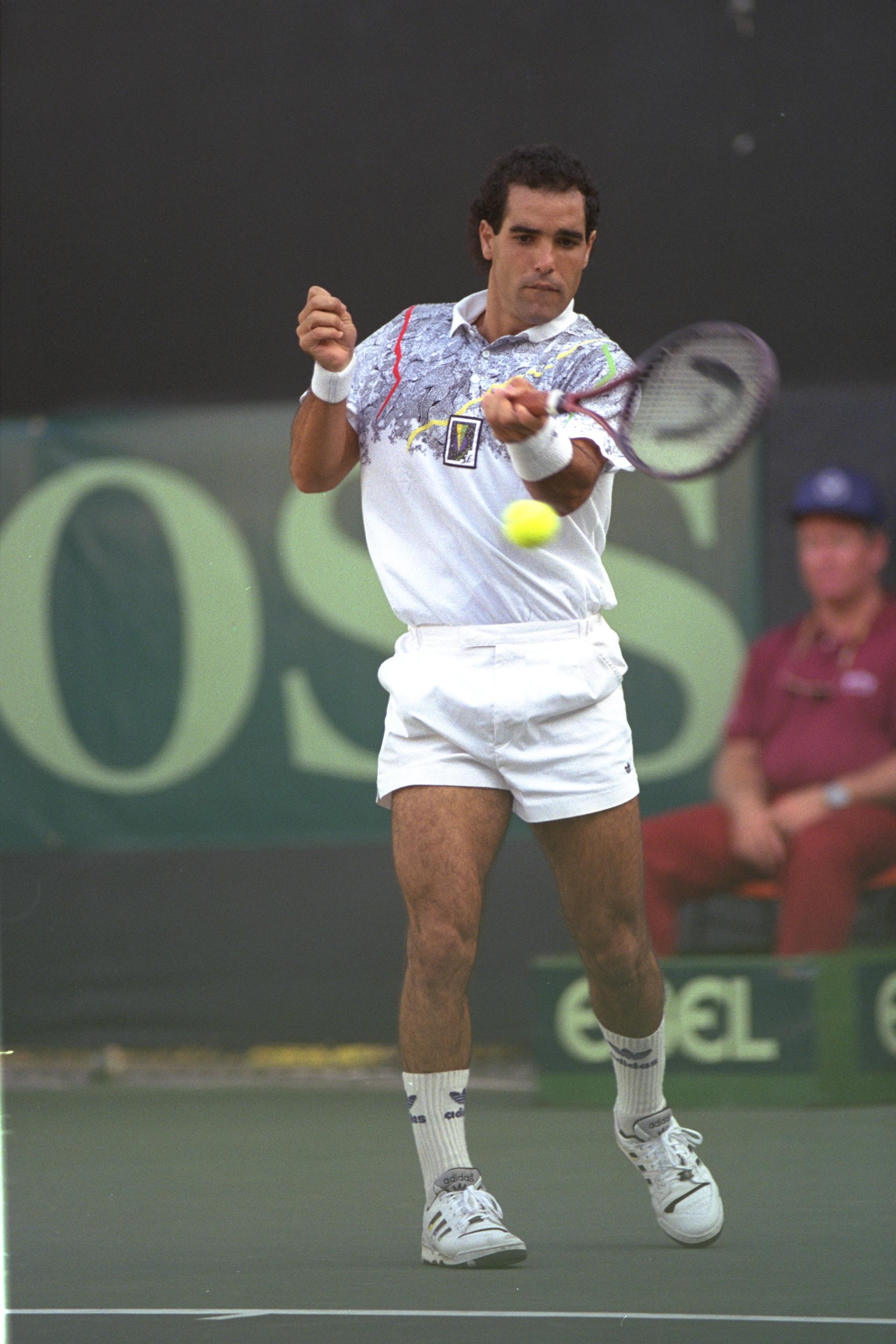 Israel's Gilad Bloom rallies in the Davis Cup Tennis Tournament against China at Ramat Hasharon. הטניסאי הישראלי, גלעד בלום, בגביע דיוויס כנגד יריבו הסיני ברמת השרון. Photo: ISRAELI ZVIKA, 09/19/1990